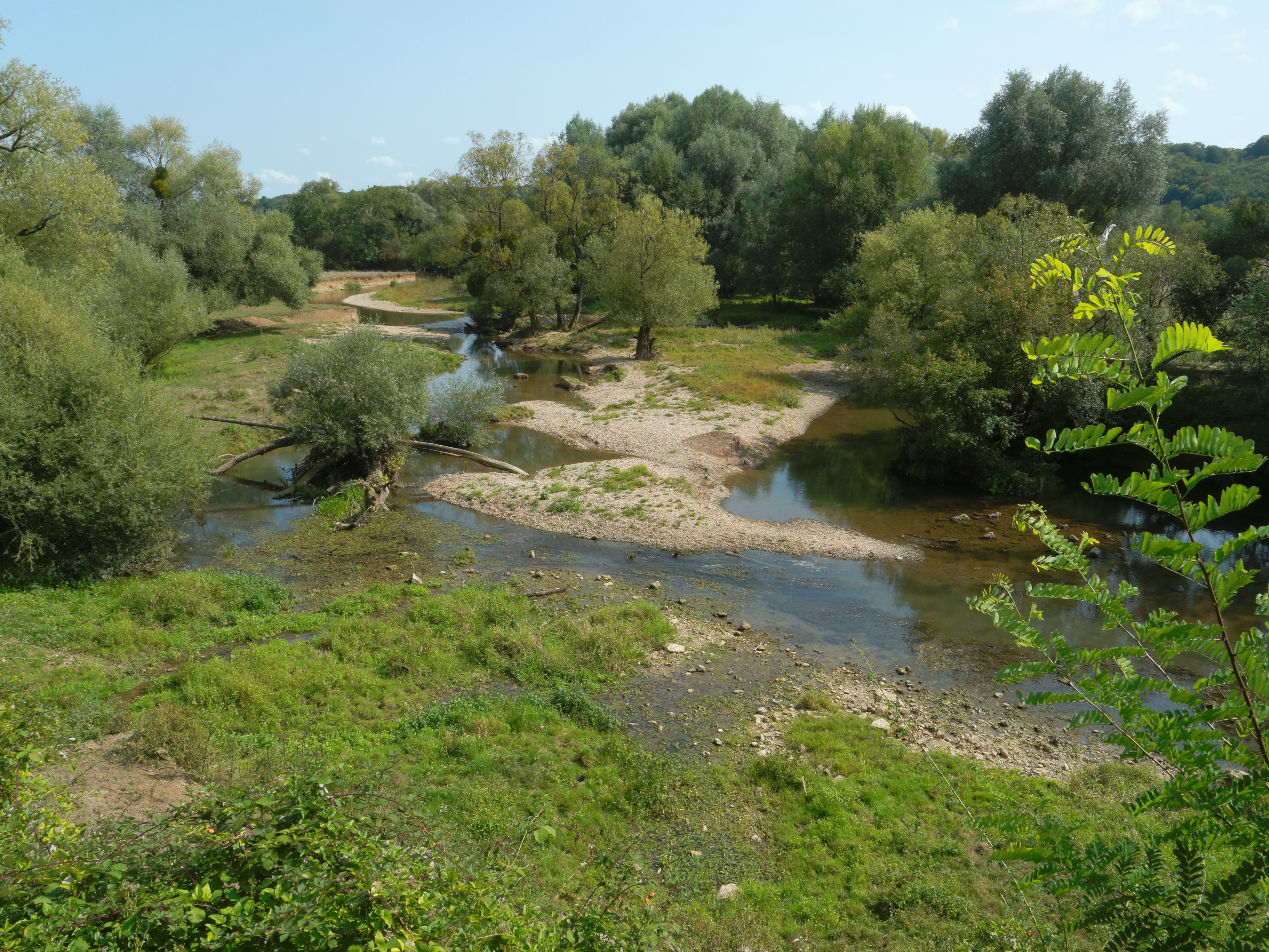 La rivière Allan, à l'état libre, à Allenjoie.